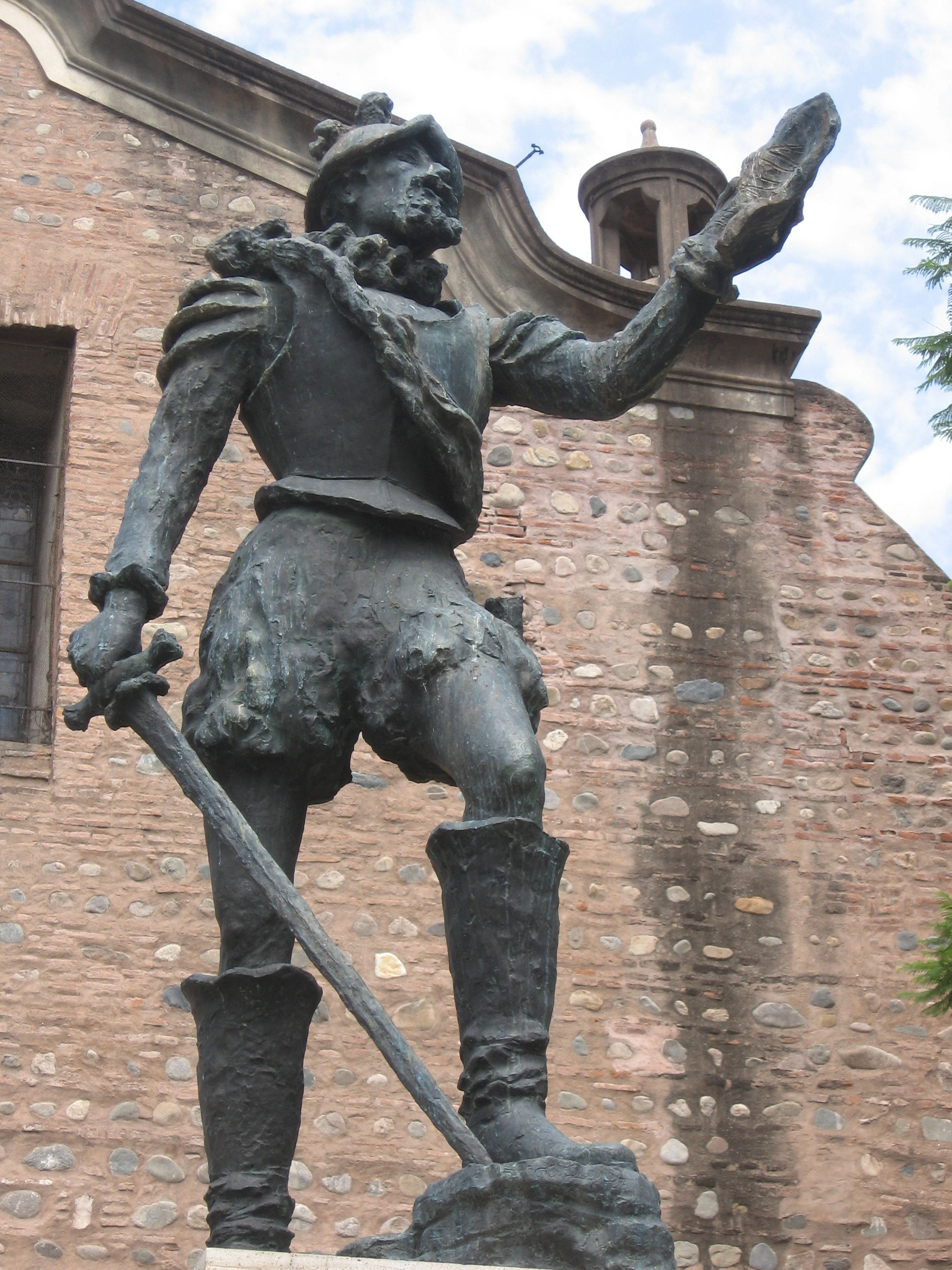 Estatua de Jerónimo Luis de Cabrera, con el máximo detalle posible